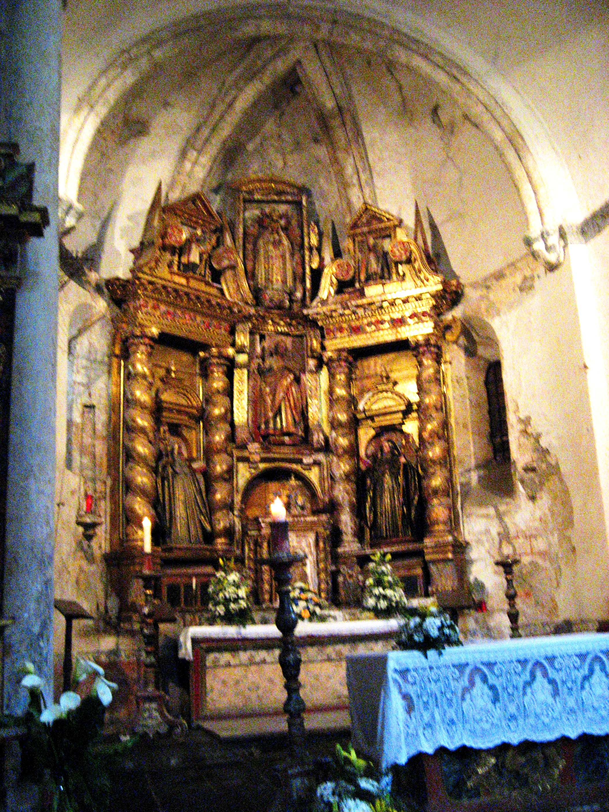 Retablo Mayor Iglesia Monasterio de San Pedro de Montes